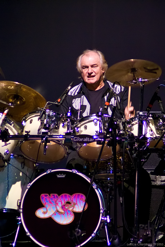 Yes concert at Gran Teatro del Banco Central del Paraguay, Asunción, Paraguay